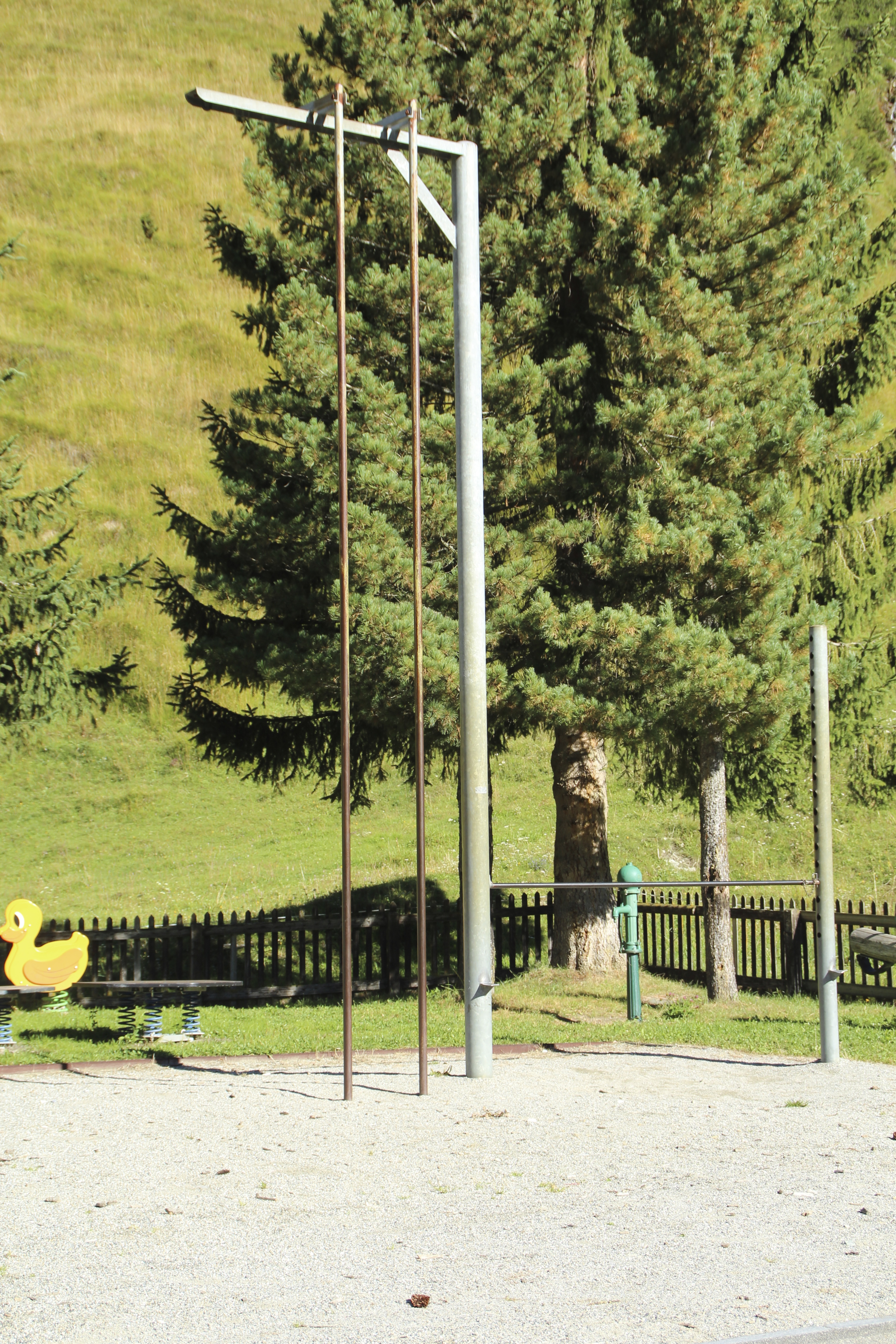 Kletterstange